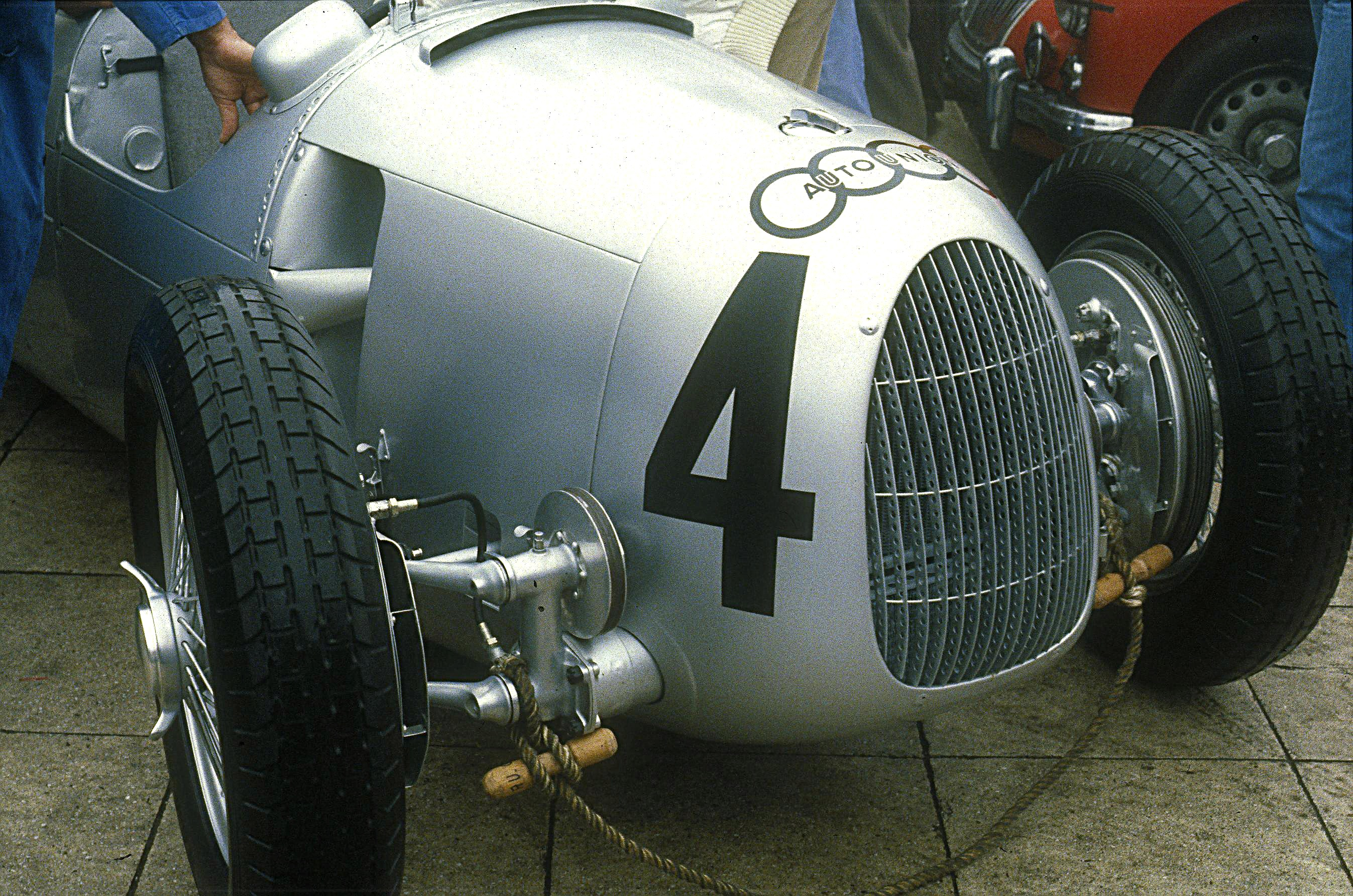 Bildbeschreibung: Vorderradaufhängung des Auto Union Typ C Fotograf: Lothar Spurzem Datum: 16.08.1980 im Fahrerlager des Nürburgrings